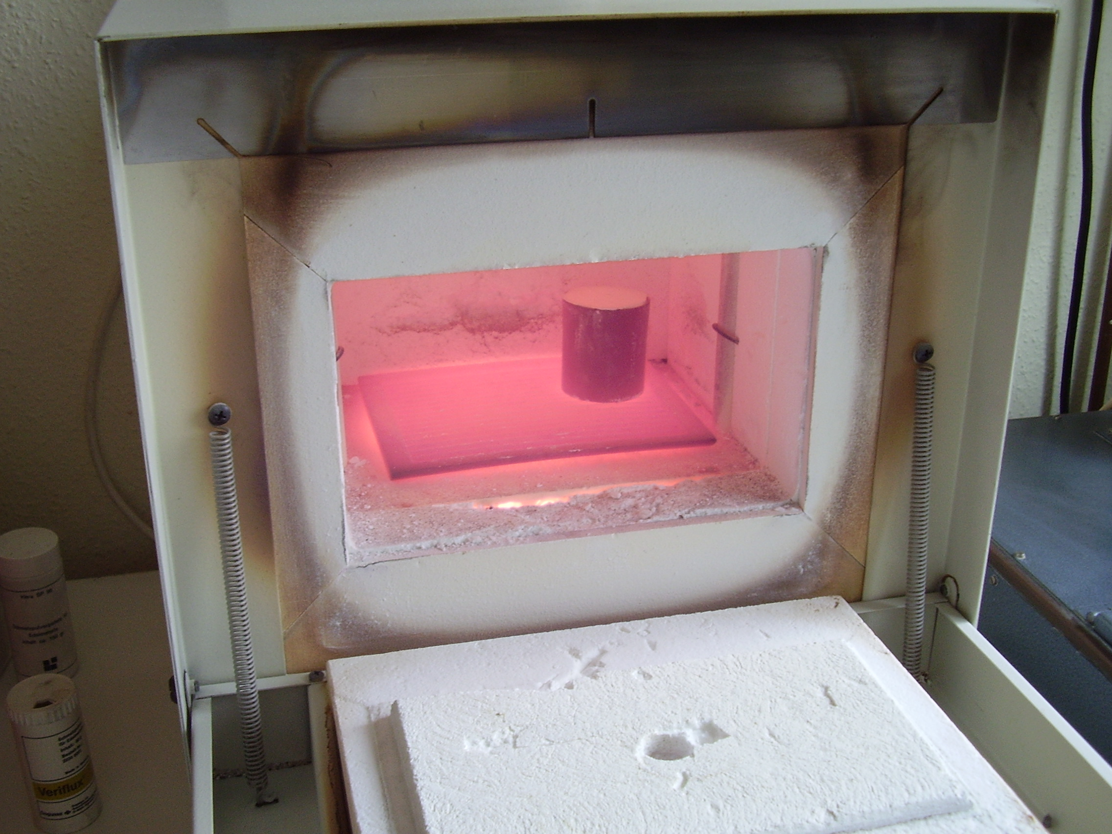 Ausbrennofen, Zahntechnik, der Wachs wird bei 800°C aus der Gussmuffe ausgebrannt, danach wird flüssiges gold in die heiße Muffe gegossen; Muffelofen